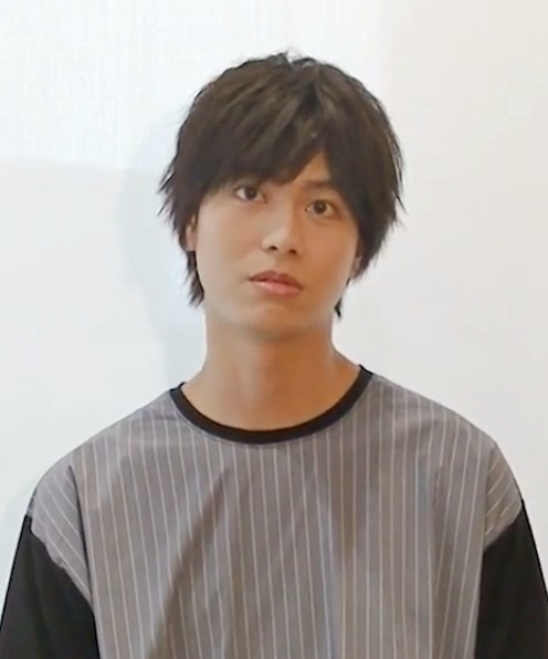 多和田秀弥(現:多和田任益)（俳優）